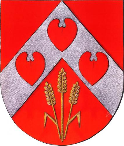 Slavíkovice TR znak